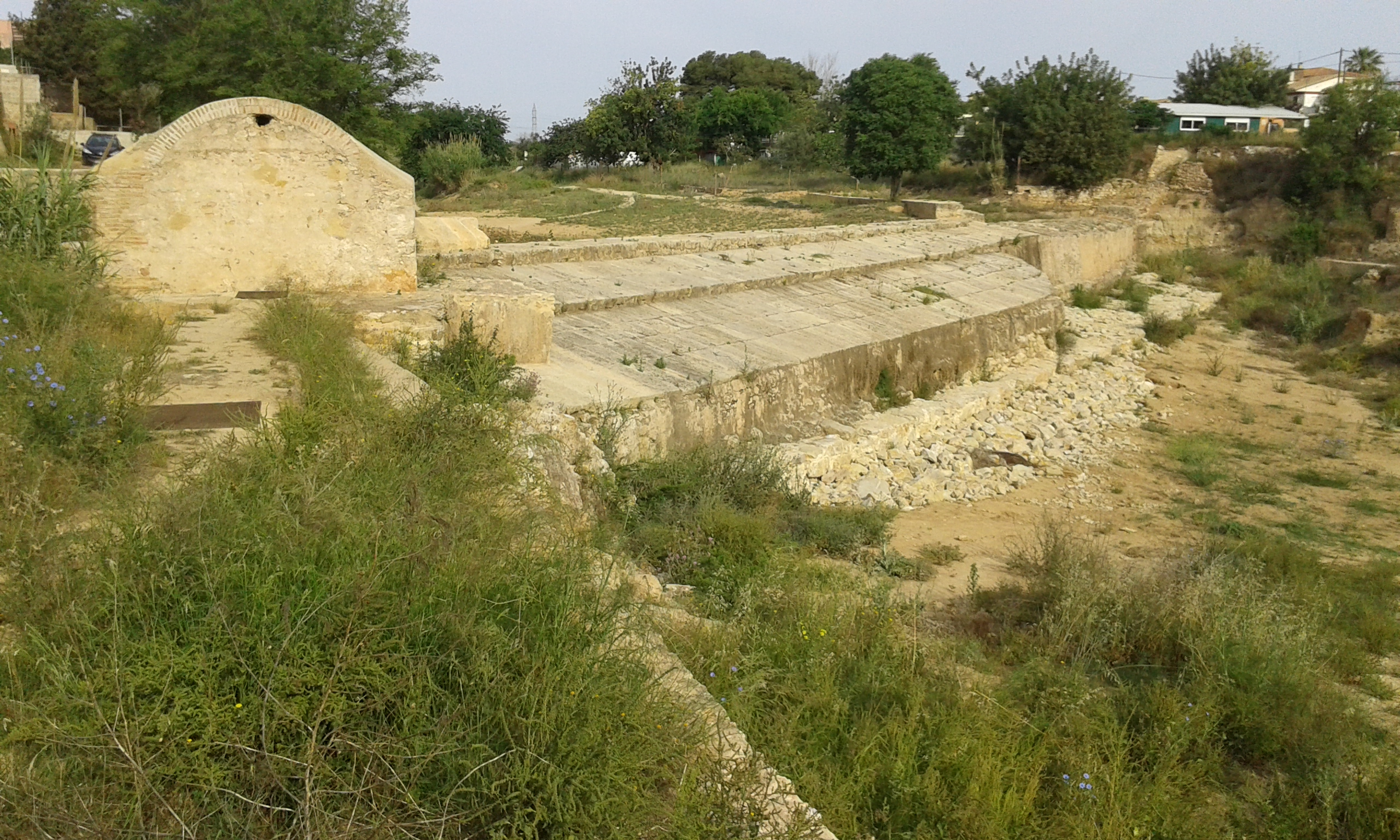 Diverses vistes i equipament del Reg mil·lenari del Barranc de l'Horteta de Torrent